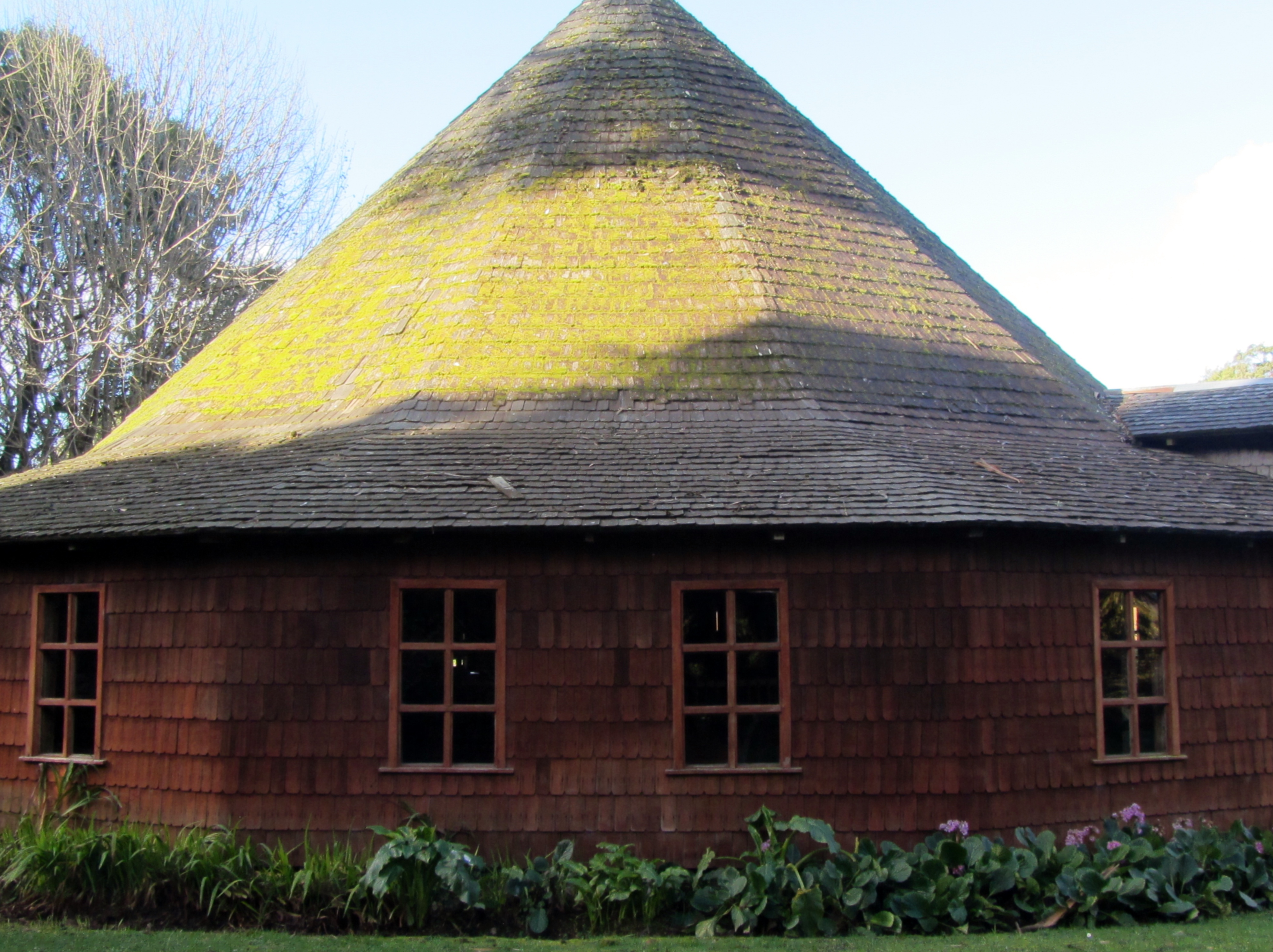 El campanario del Museo Colonial Alemán de Frutillar, Chile.